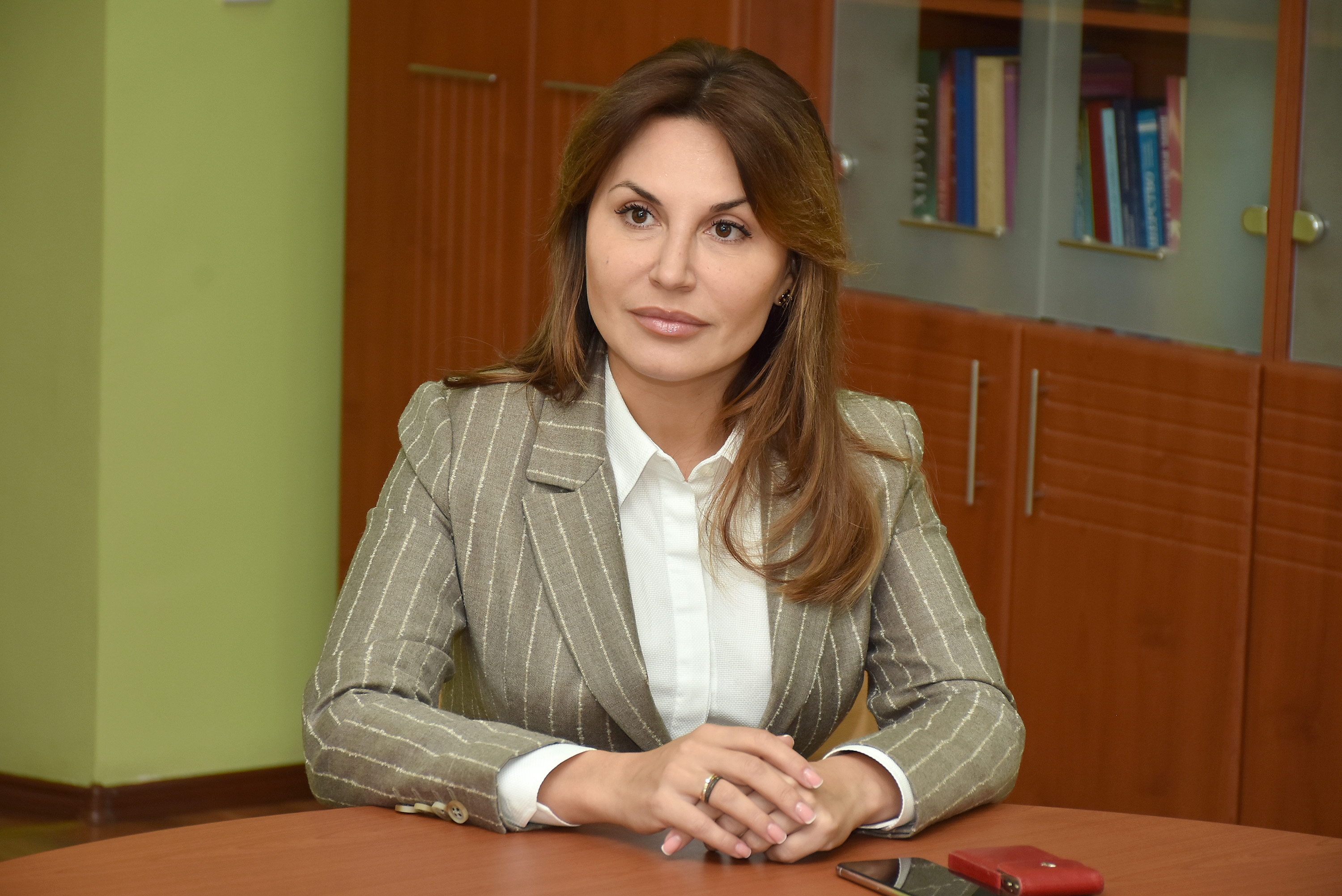 Українська політик та громадська діячка, народний депутат VIII скликання, заступник Голови Комітету Верховної Ради України з питань охорони здоров’я Ірина Сисоєнко під час візиту до Тернопільського державного медичного університету імені І. Я. Горбачевського 9 жовтня 2018 року.